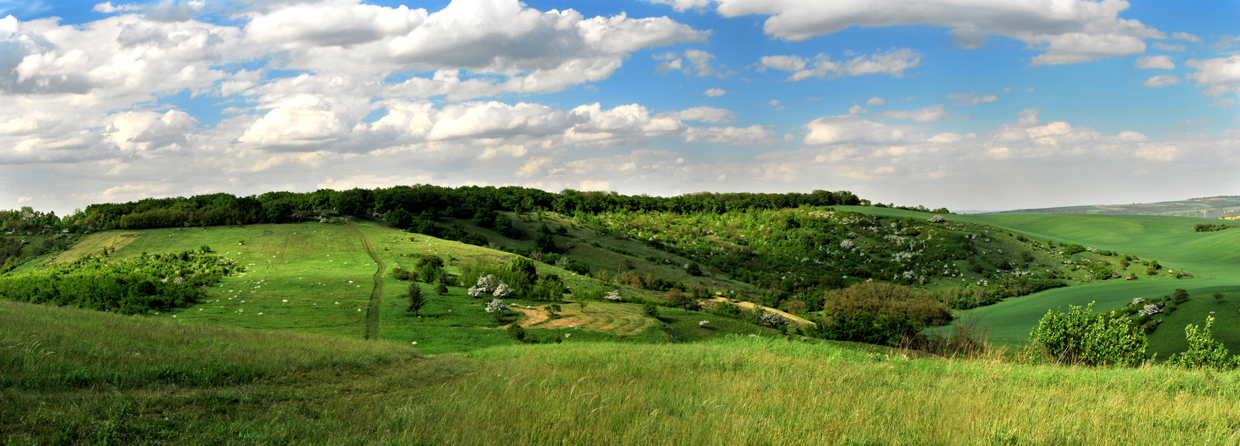 Stepní pahorkatina